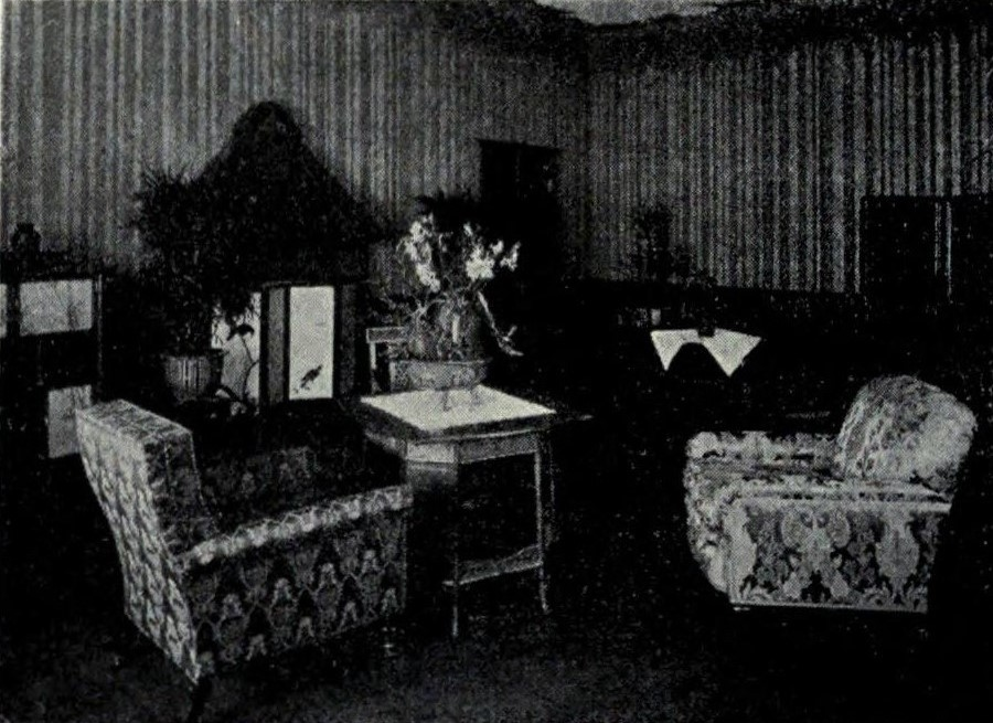 竹の間」では腰羽目（＝壁の腰の部分に張った羽目板）に、煤竹を廻らせている。壁は絹で直立する竹を描いていた。この和洋折衷の休憩室は、三越が手掛けたパリの日本大使館の「竹の間」と同じ手法で、装飾が施されている